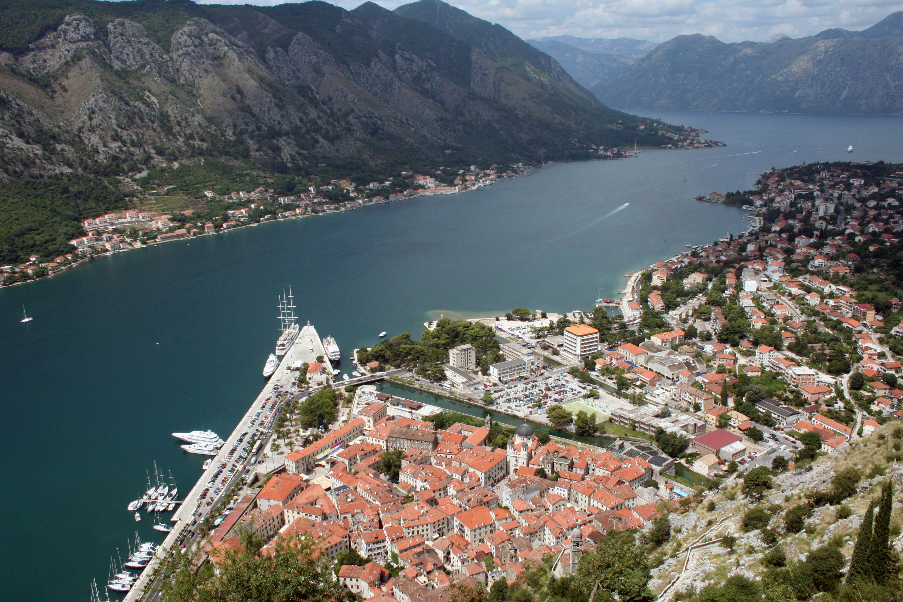 Panorama di Kotor (Cattaro) - la baia dalla fortezza di S. Giovanni. Autore: Rocco Stasi, fatta da me, sono l'autore. GFDL, sono l'autore